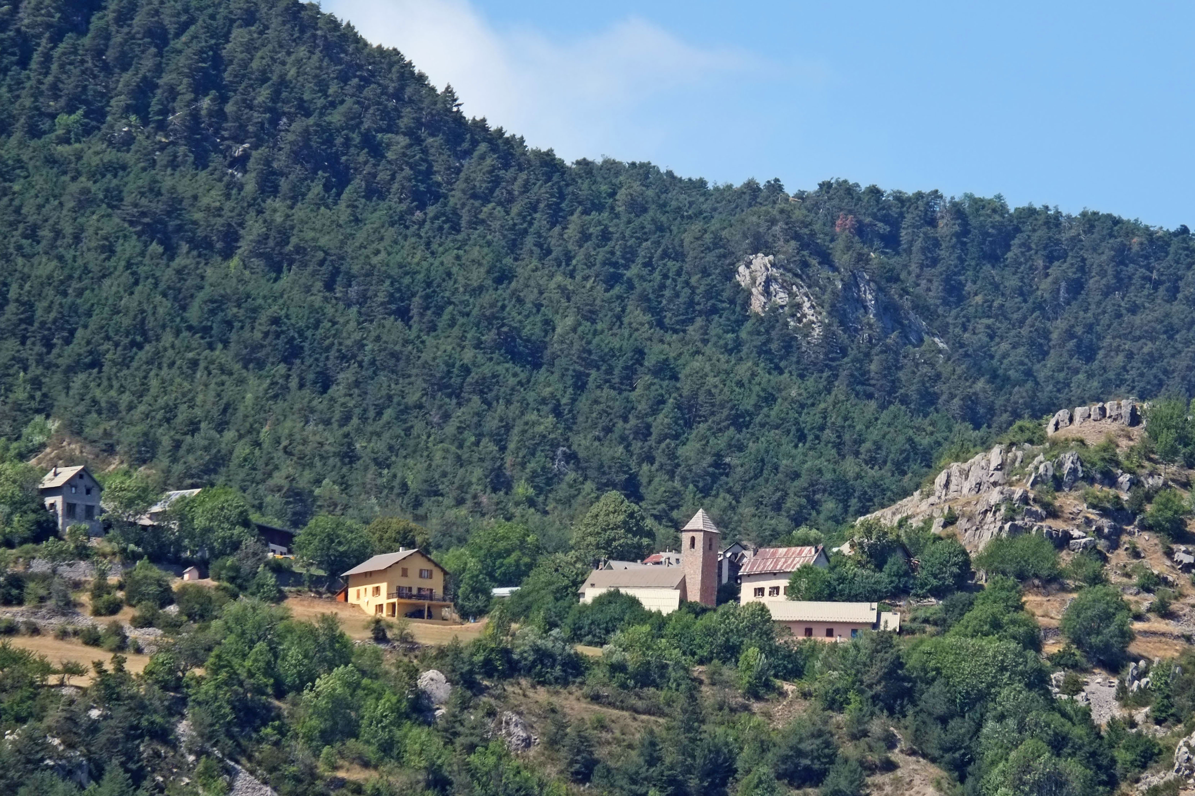 Vue du village de Sauze depuis la piste de Villetalle de Guillaumes.